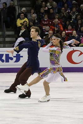 Елена Ильиных и Никита Кацалапов на Чемпионате мира 2013